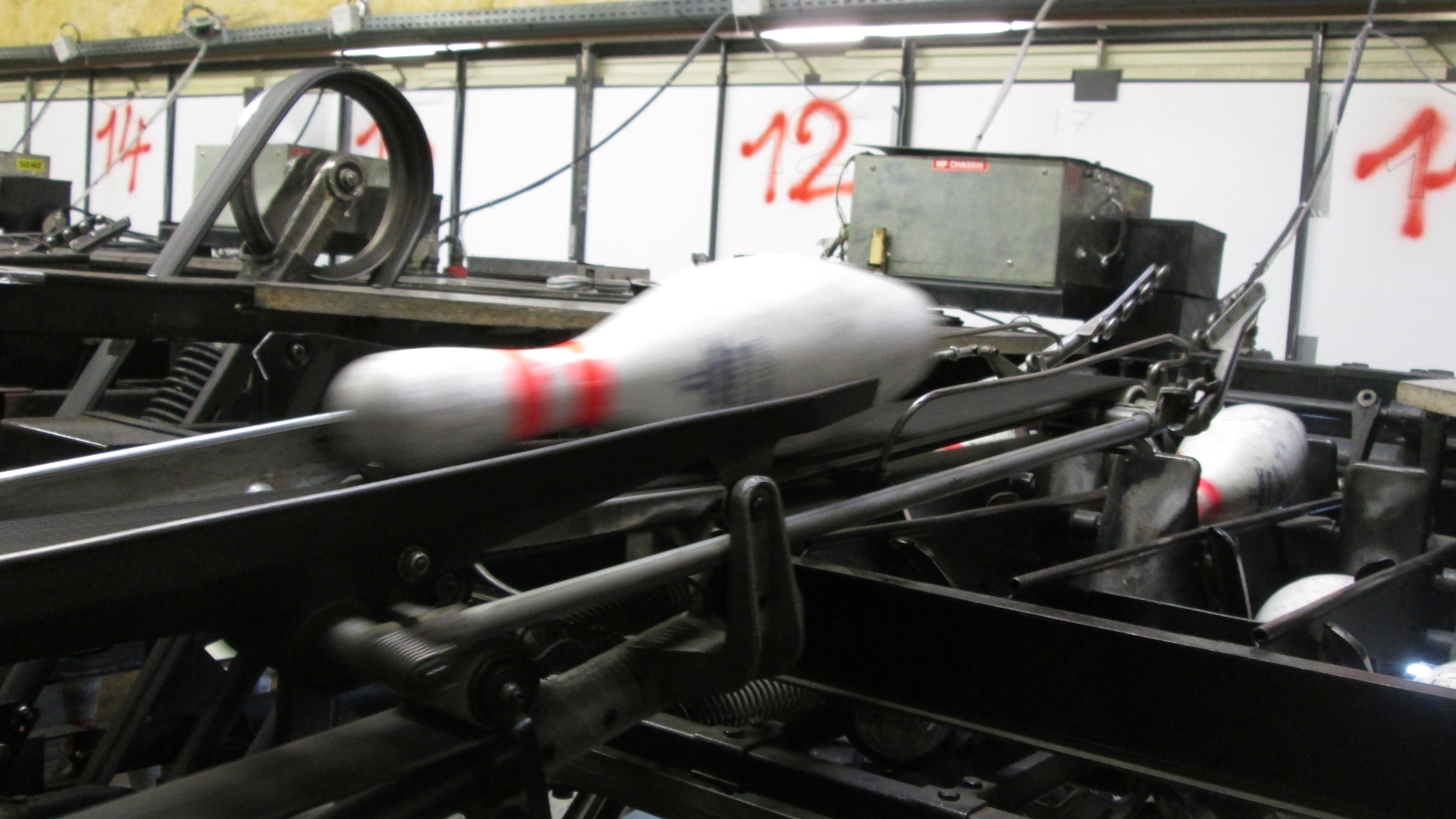 Machine AMF 82-70 plaçant les quilles sur le distributeur.